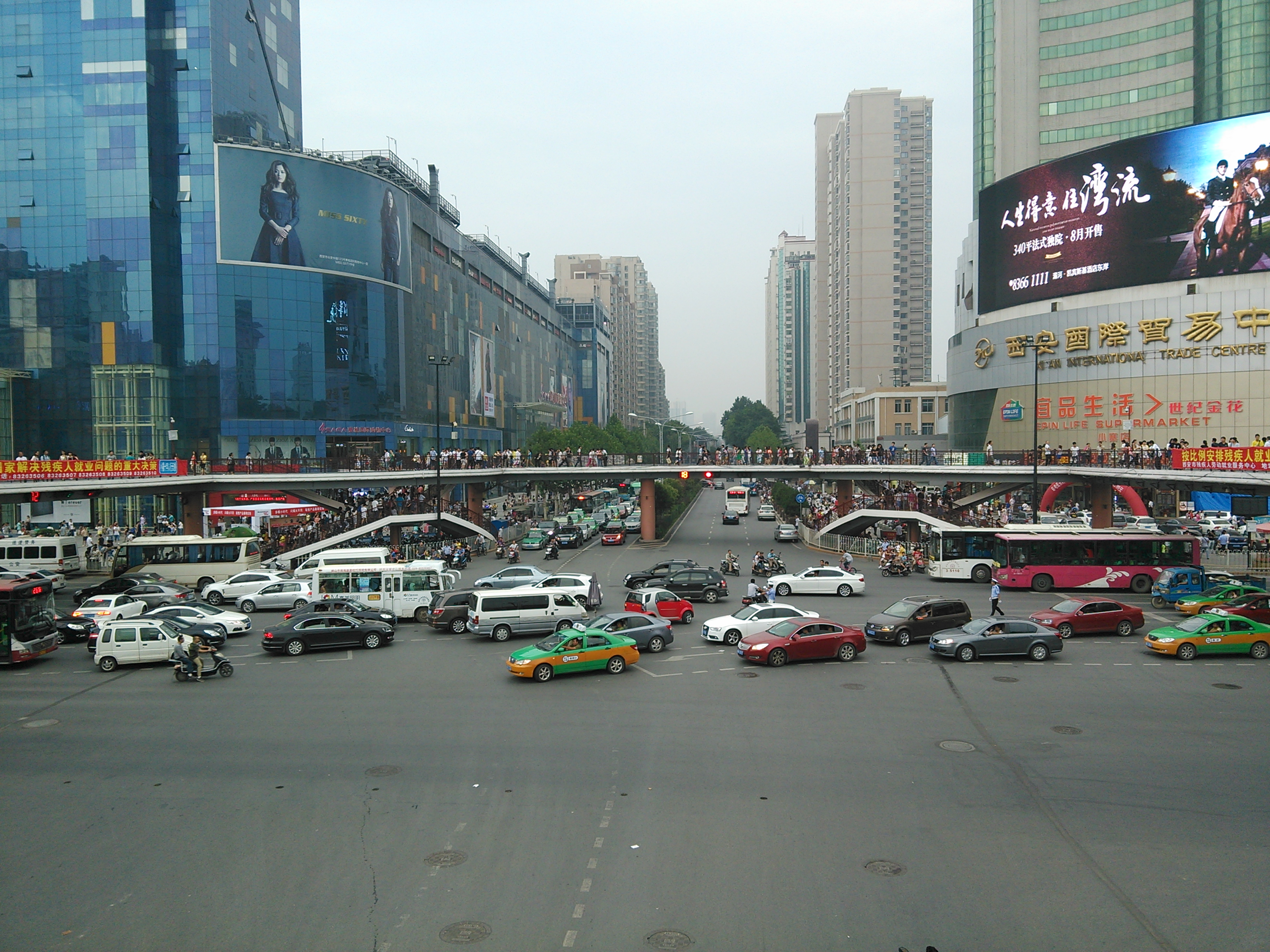 小寨过街天桥